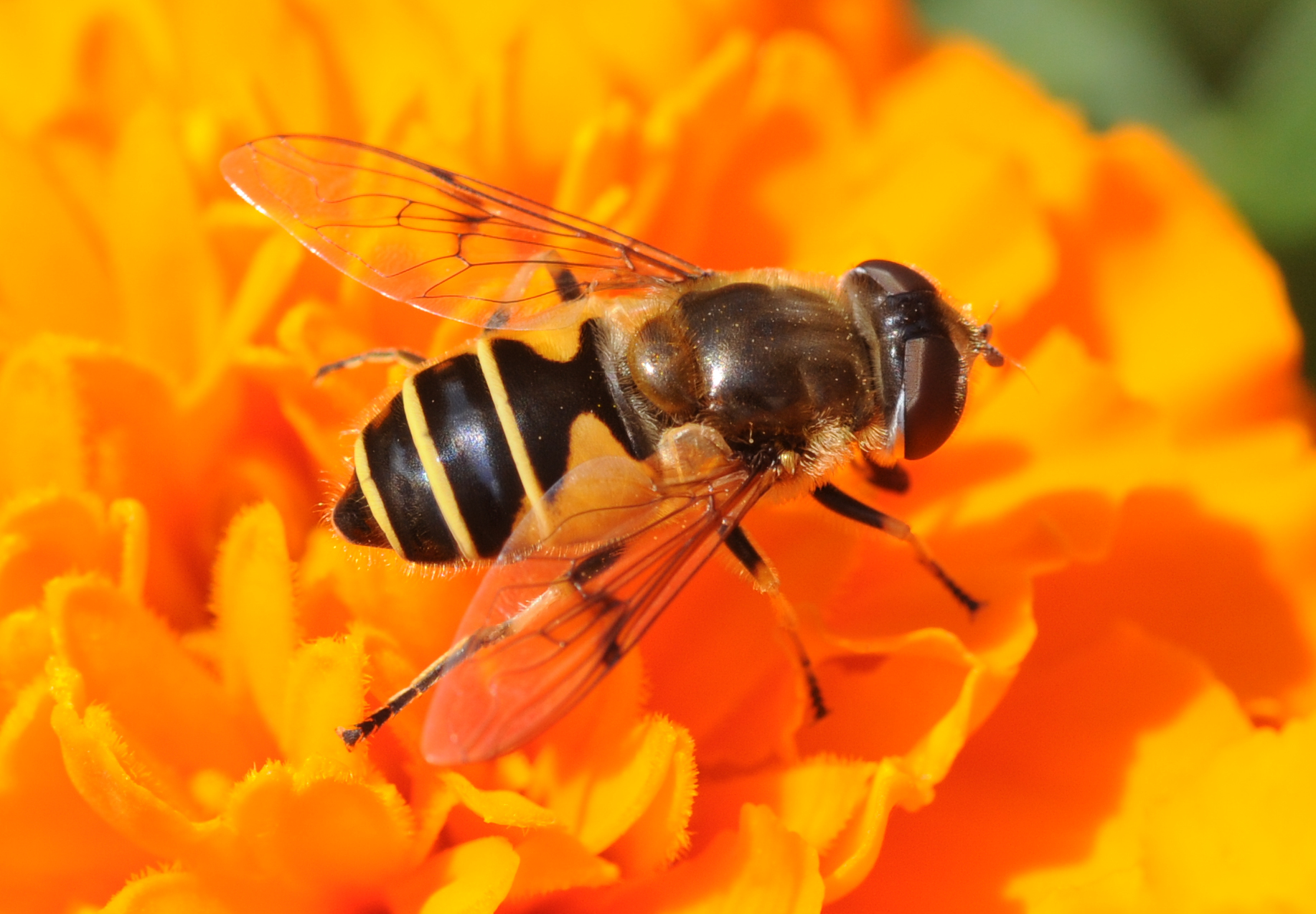 Insecte de la famille des syrphidées (syrphes).